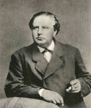 Carl Gustaf Hessler (1816-1899)